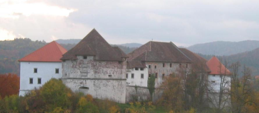 Turjak castle, Slovenia photo:Ziga 06:20, 26 October 2006 (UTC)